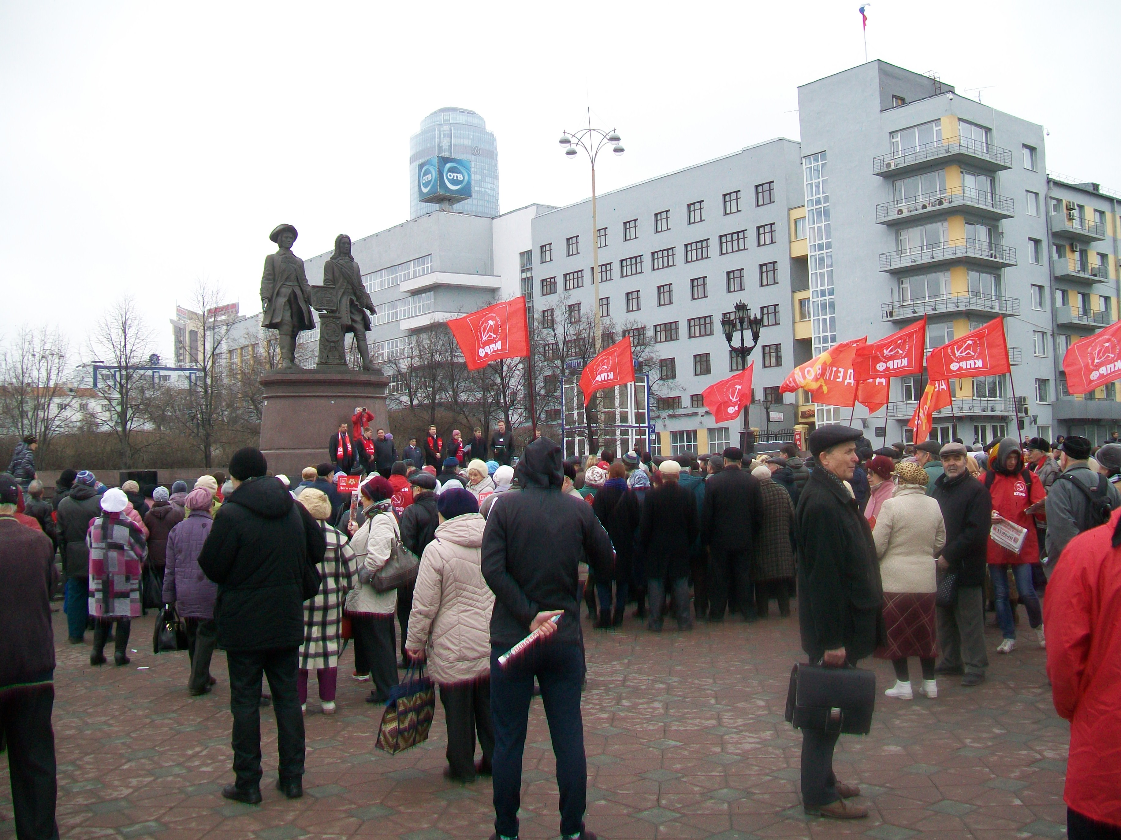 Панорама митинга 15 апреля 2017 года в Екатеринбурге